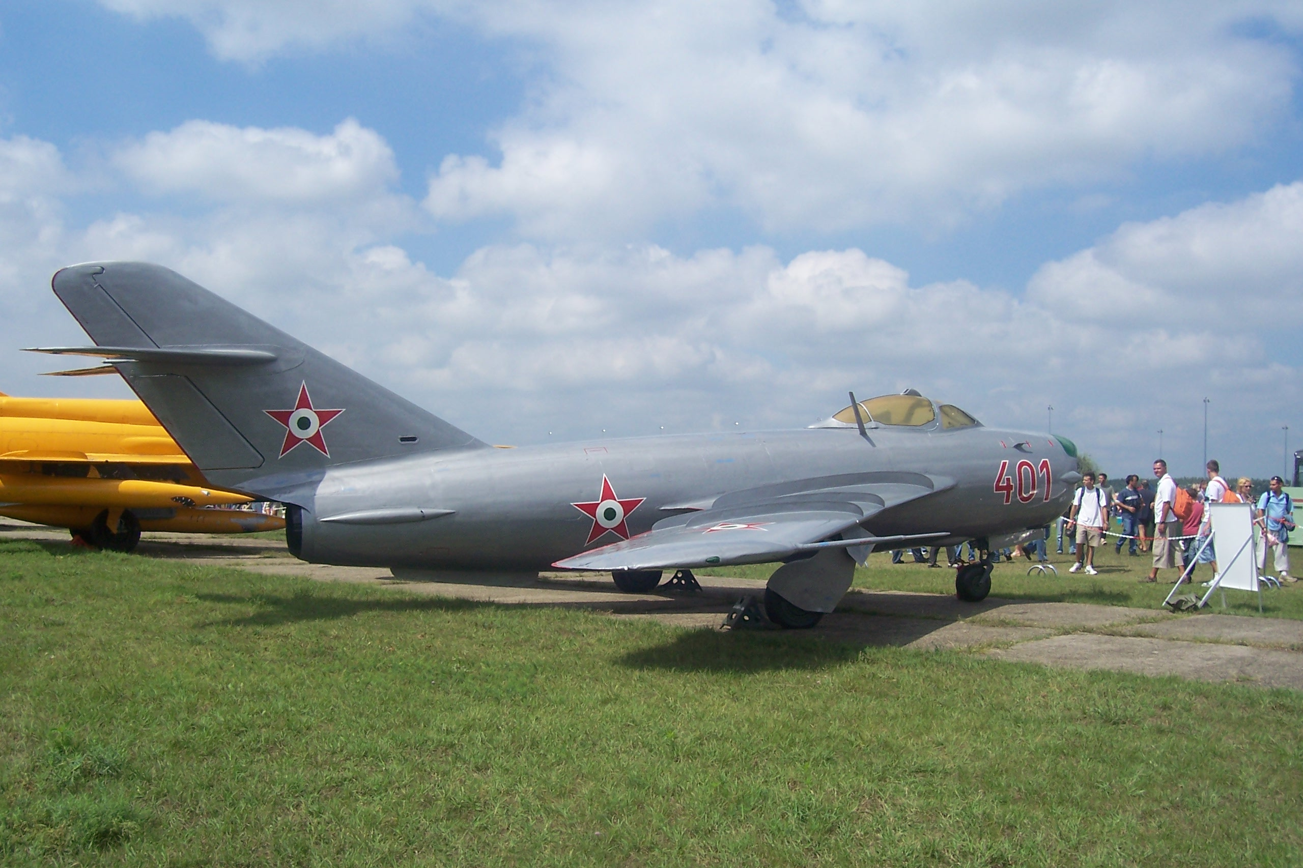 Egy restaurált MiG-17PF a 2010-es kecskeméti repülőnapon.